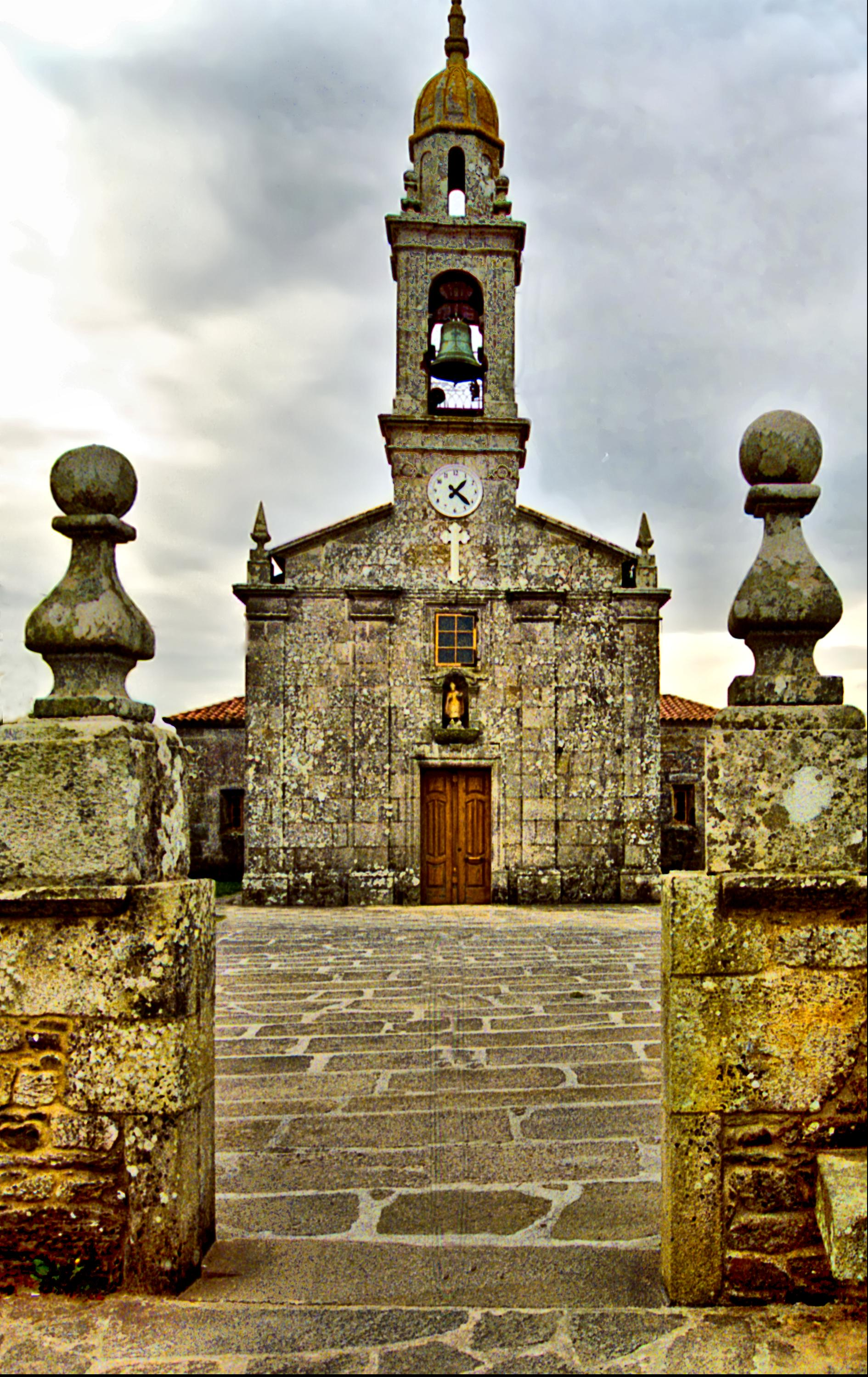 Iglesia Romanica San Martino de Cores, Ponteceso, Galicia (3)